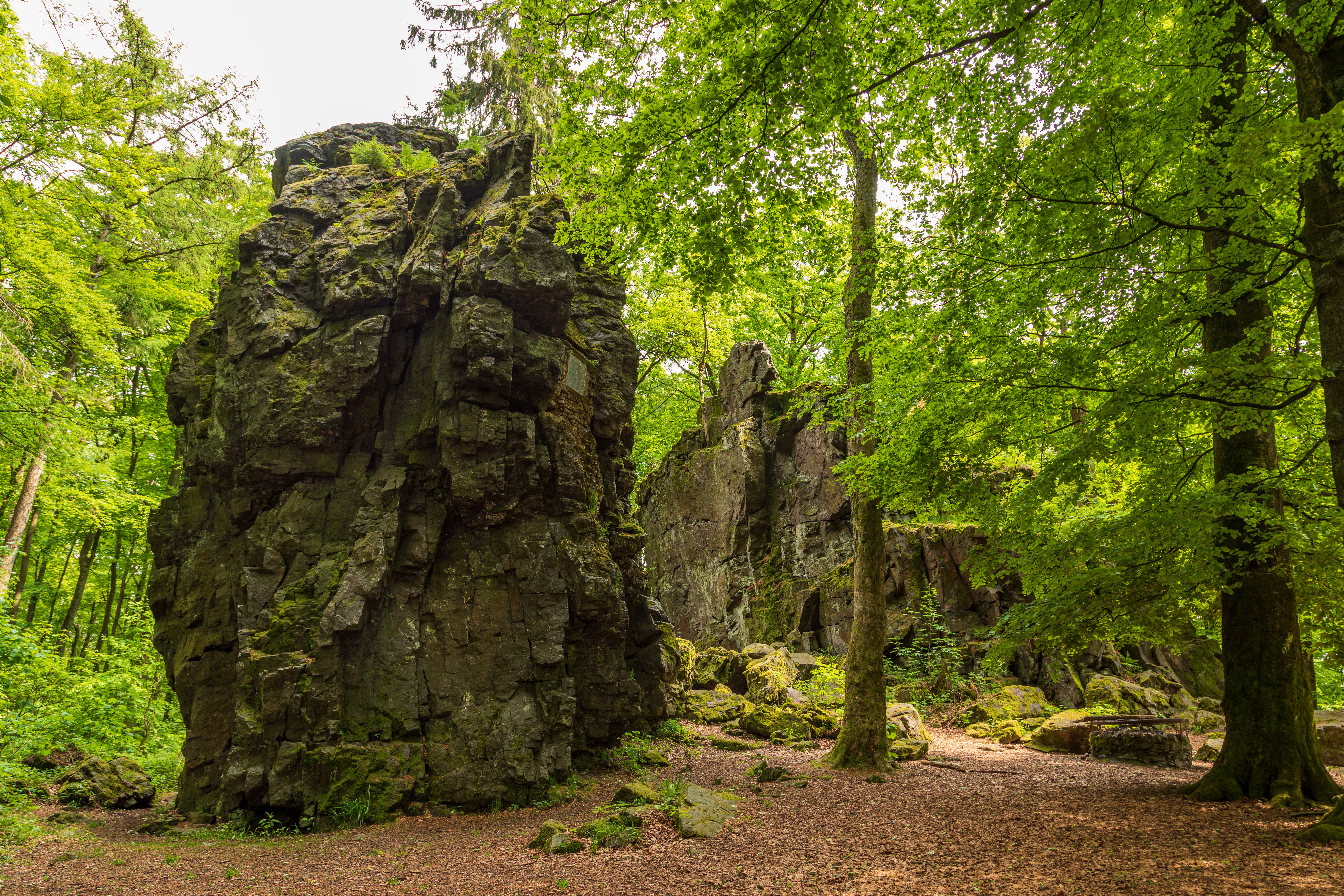 Wilhelmsteine - Naturdenkmal und Geotop